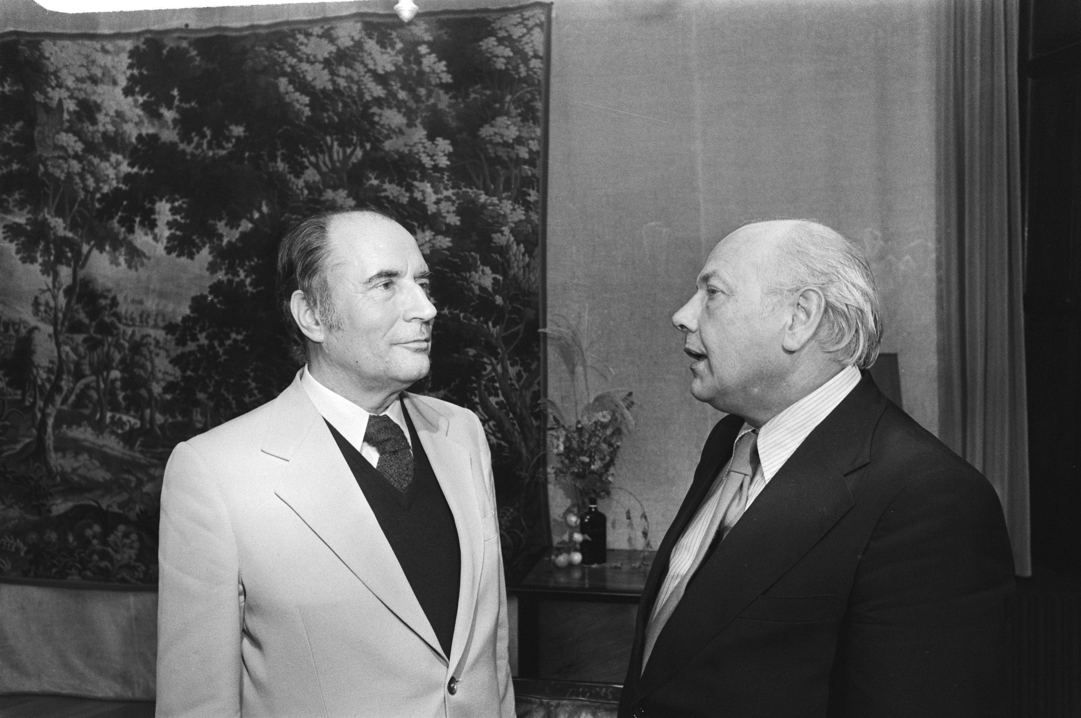 Collectie / Archief : Fotocollectie Anefo Reportage / Serie : [ onbekend ] Beschrijving : Premier Den Uyl (r) ontvangt Franse socialistenleider François Mitterrand op Catshuis Datum : 28 september 1976 Trefwoorden : ontvangsten, premiers Persoonsnaam : Mitterrand, François, Uyl, Joop den Fotograaf : Verhoeff, Bert / Anefo, [onbekend] Auteursrechthebbende : Nationaal Archief Materiaalsoort : Negatief (zwart/wit) Nummer archiefinventaris : bekijk toegang 2.24.01.05 Bestanddeelnummer : 928-8063